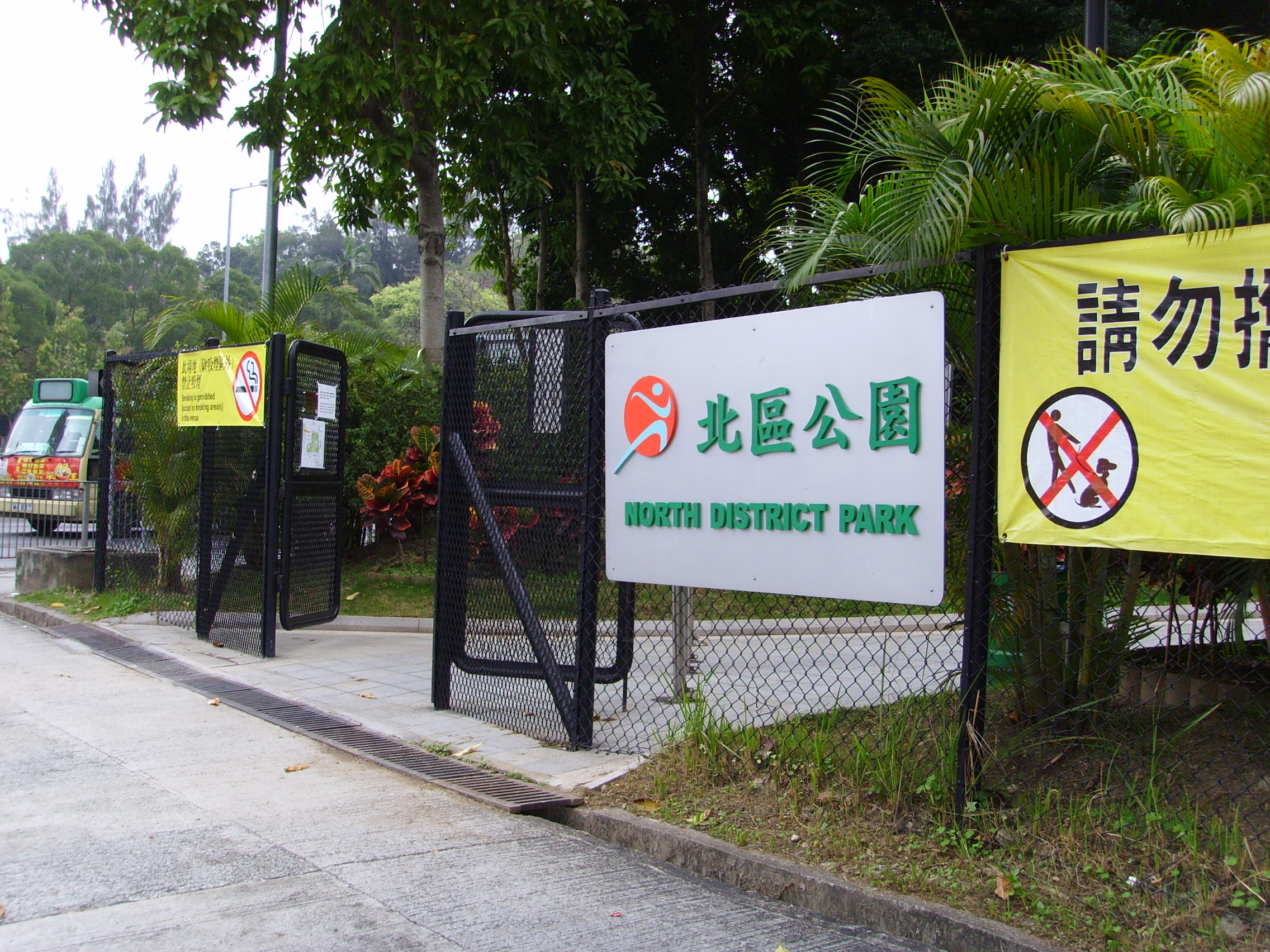 北區公園第一期近掃管埔路入口